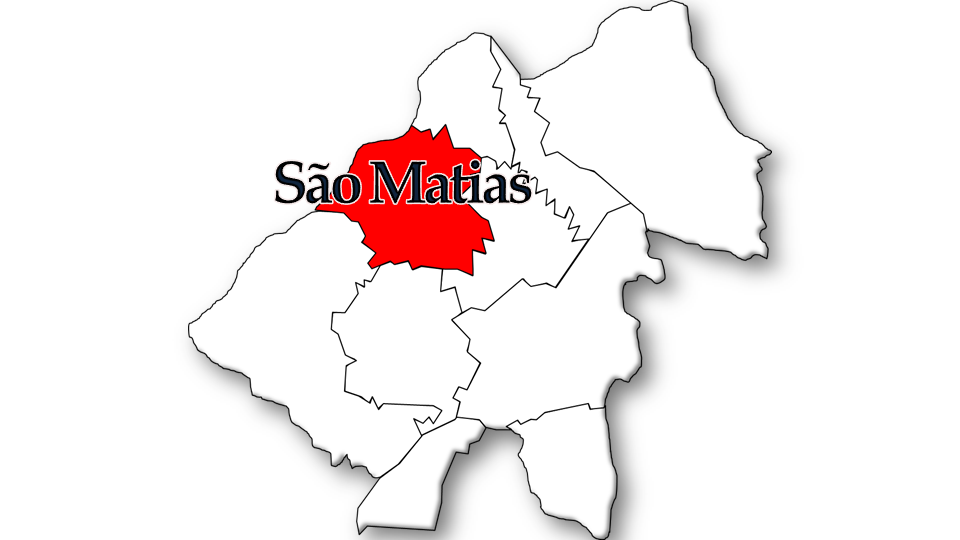 Evolução da População